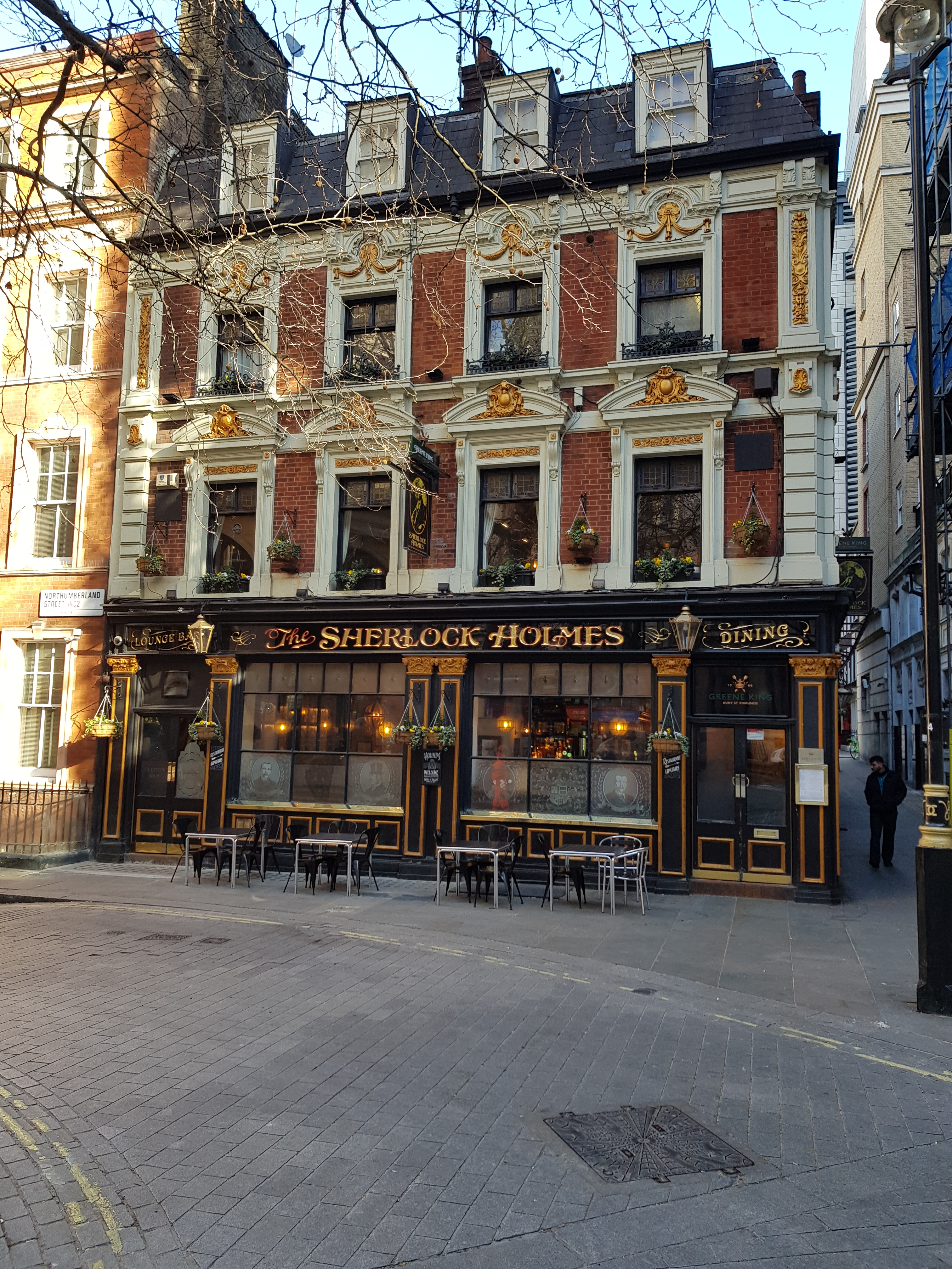 Pub The Sherlock Holmes, Londres.